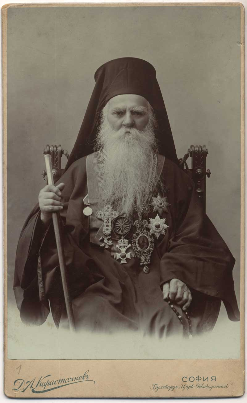 Митрополит Натанаил Охридски и Пловдивски